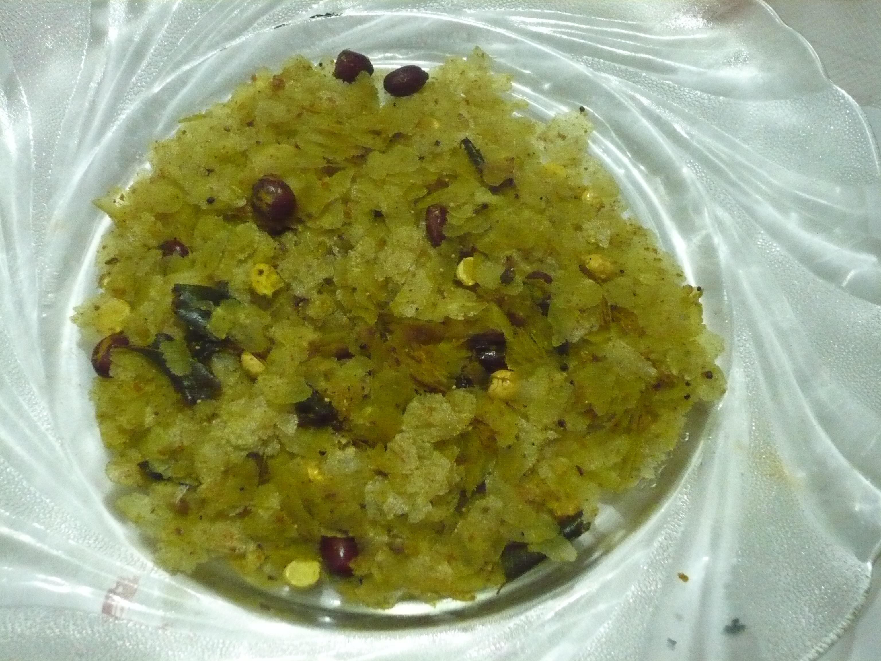 चिवडा